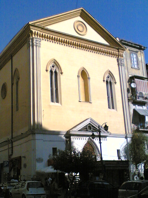 Chiesa delle Crocelle ai Mannesi (Napoli)